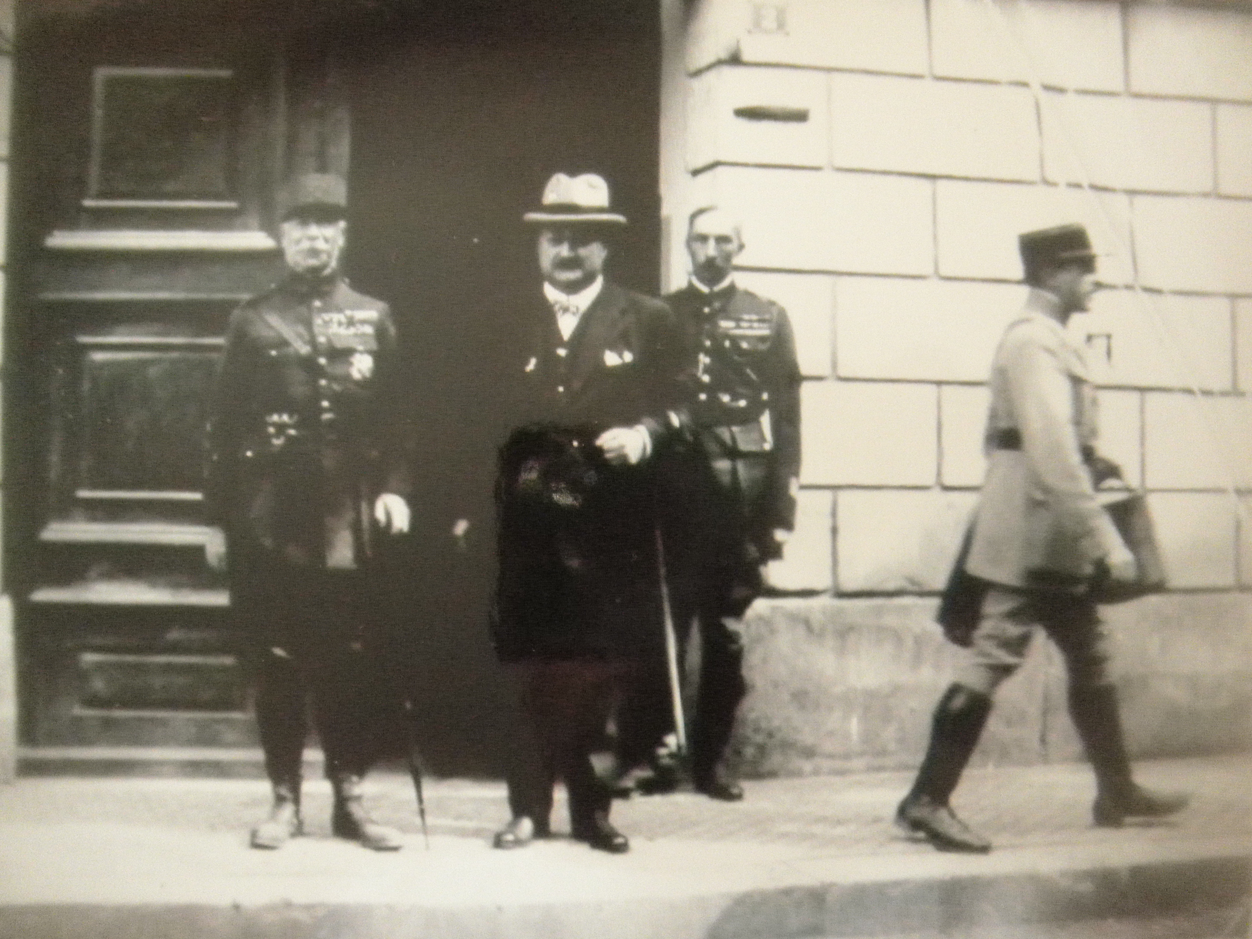 Ecole de Guerre 1908